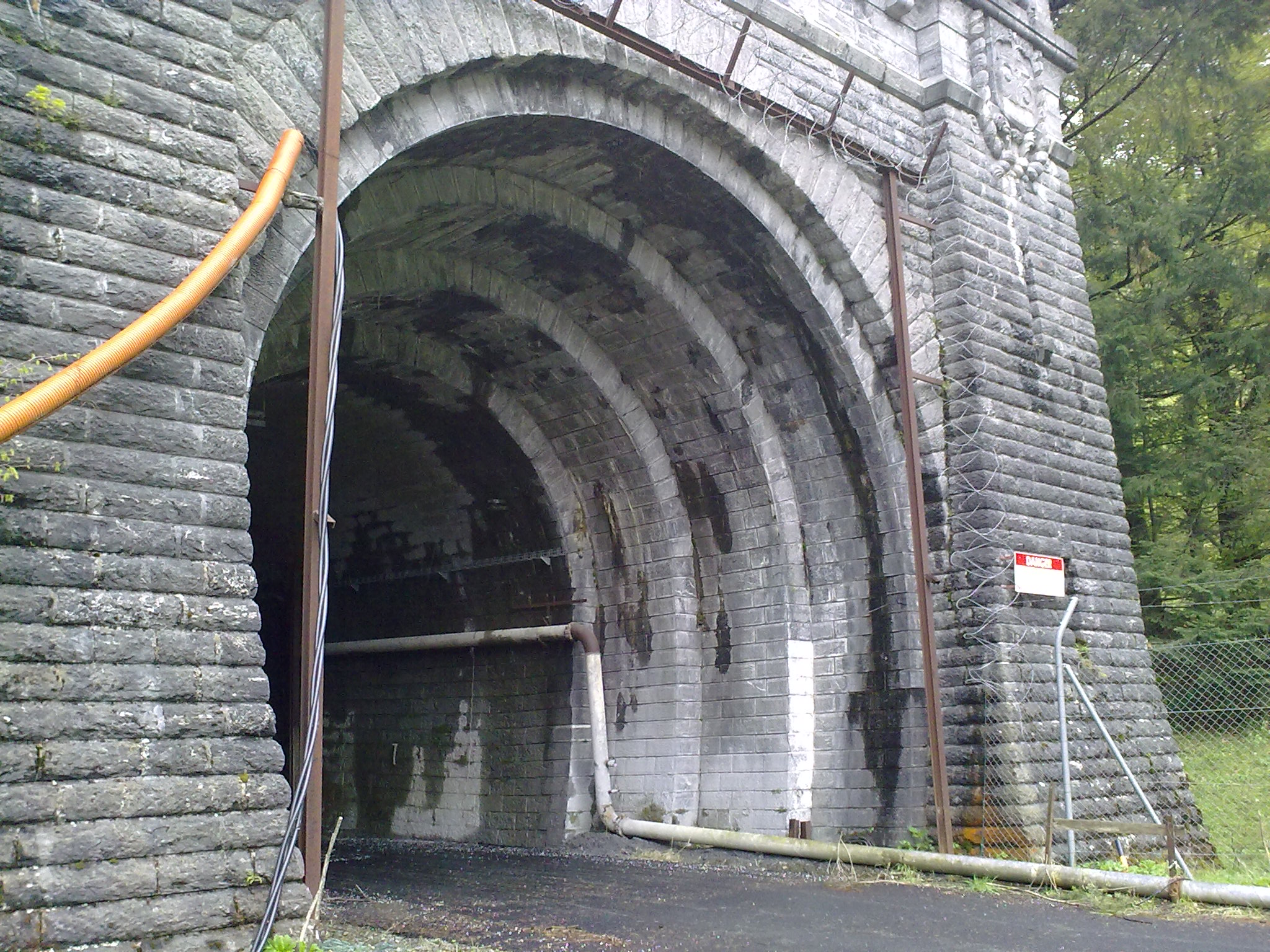 Tunnel ferroviaire du Somport, côté français le 16 mai 2010.